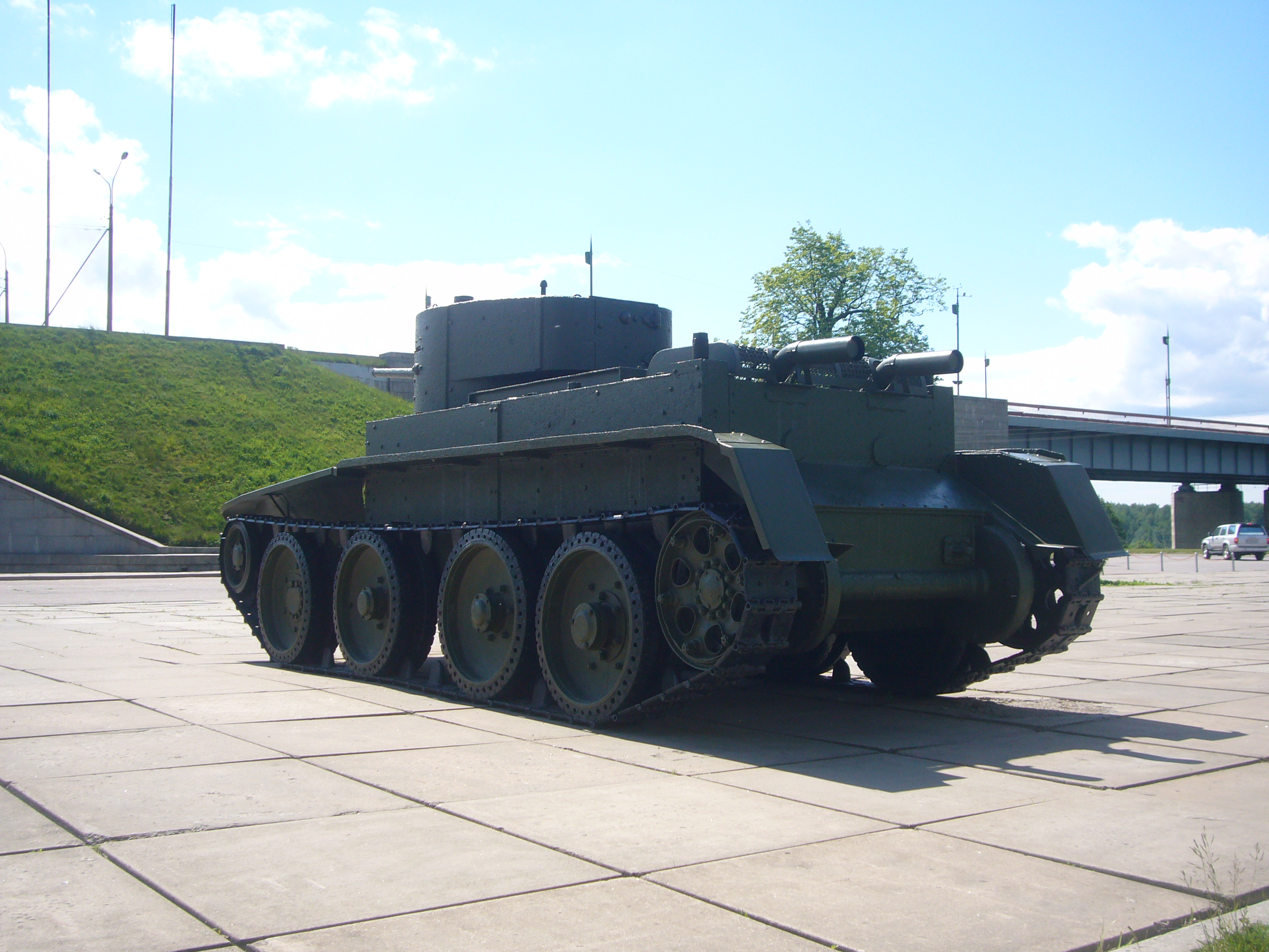 БТ-5 у диорамы «Прорыв блокады Ленинграда». Вид слева-сзади.